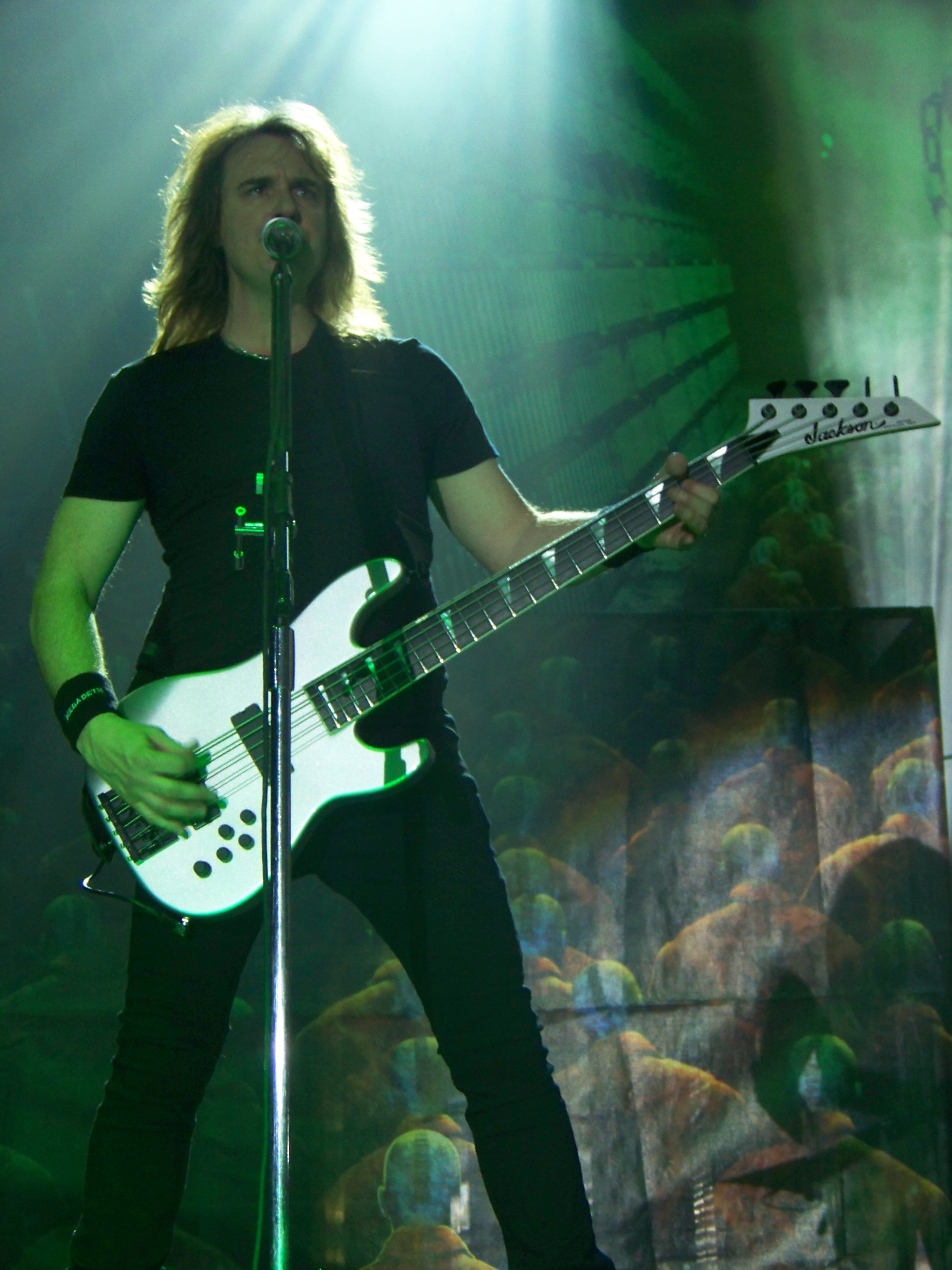 Фото Дэвида Эллефсона из Megadeth. Март 2011, Киев, концерт Megadeth и Slayer.